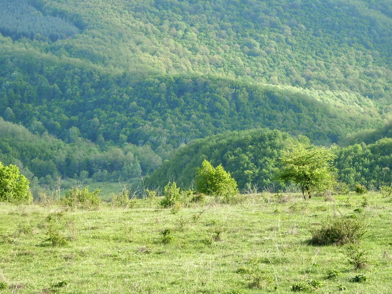 Поглед към Голияма река хълмът с античната крепост до нея